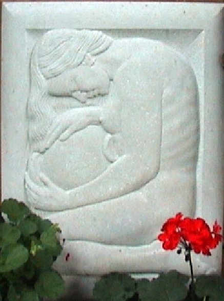 Die Prüfungsarbeit des Künstlers. Wien, 1946. "Der Stein war so teuer und ich hatte so großen Hunger"(Hellmuth Marx).